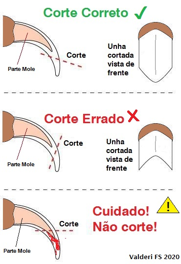 O corte de unha do Porquinho-da-Índia deverá ser feito de modo correto, senão poderá acarretar problemas de saúde e dor no animal.